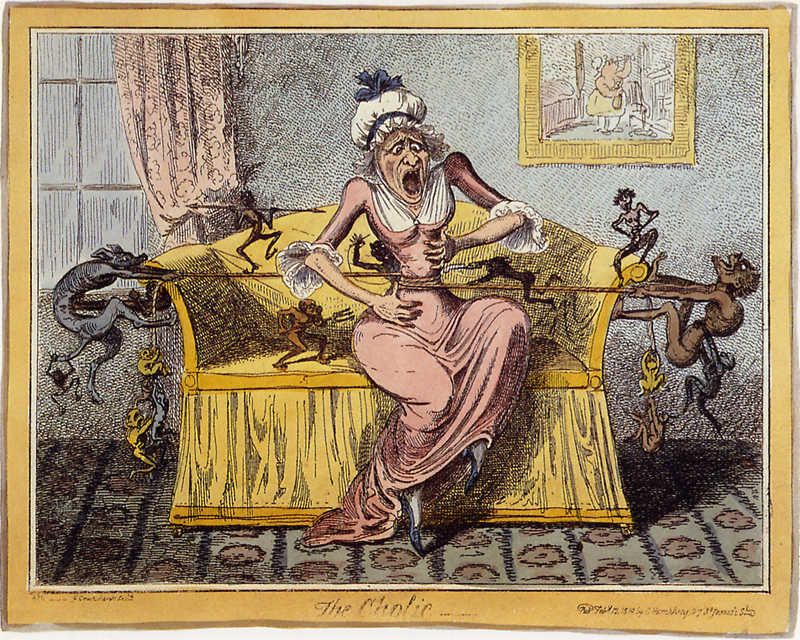 Die Dame hatte sich – wie das Bild an der Wand zeigt – zu früheren Zeiten gerne ein Glas Alkohol genehmigt.